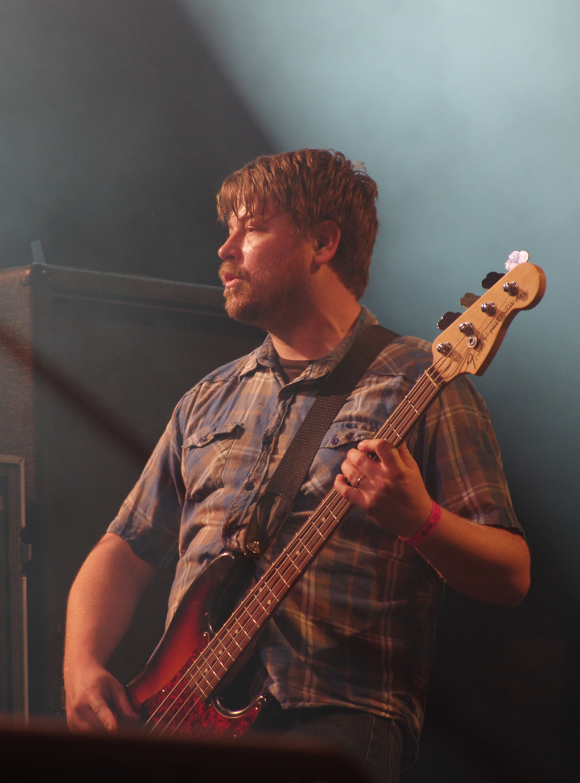 Black Flag beim Ruhrpott Rodeo 2013 in Hünxe. Besetzung: Dave Klein (Bass), Greg Ginn (guitar), Ron Reyes (voc), Gregory Moore (dr)